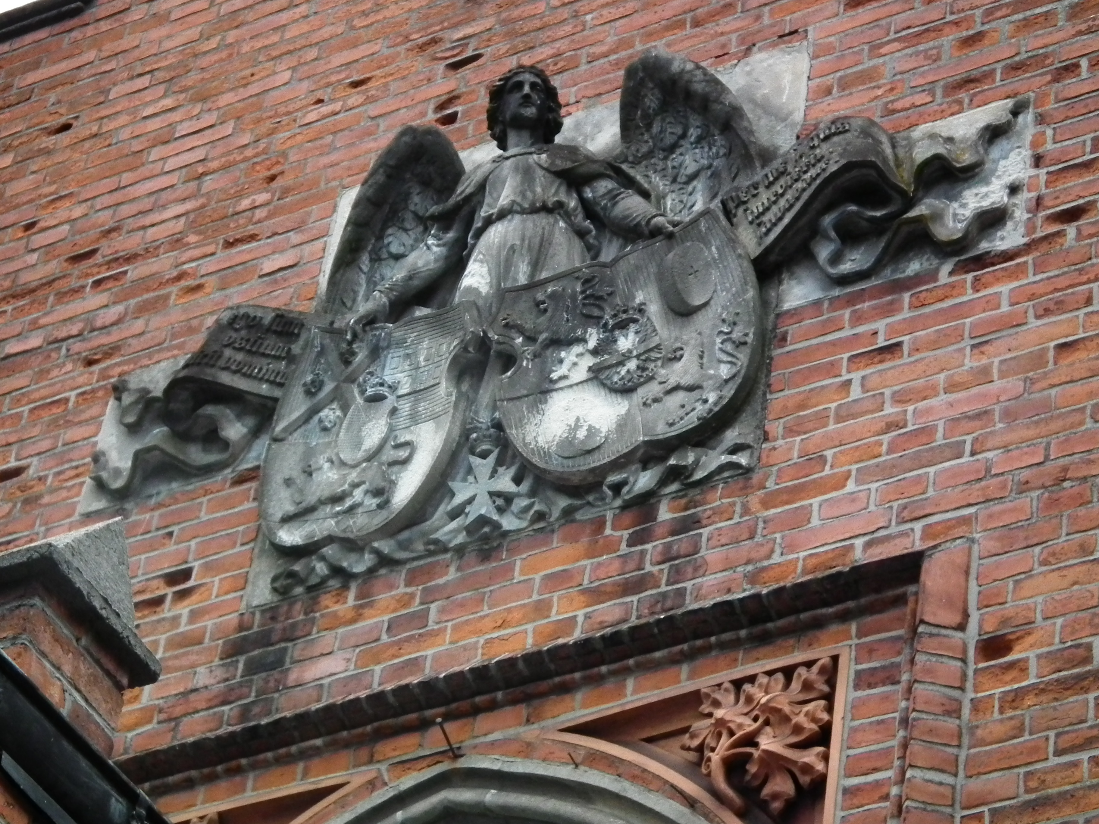 Kościół Podwyższenia Krzyża Św. w Żelowicach.